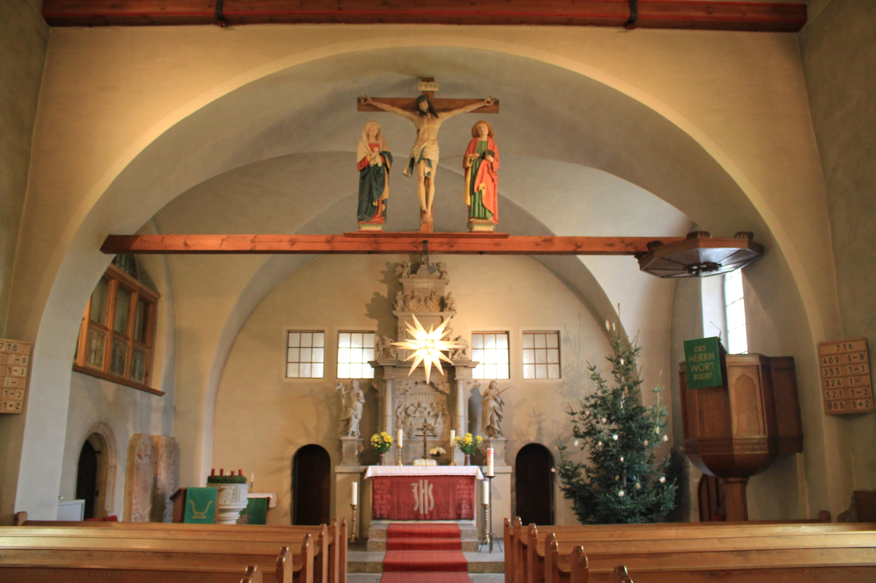 Hornjoserbsce: W Njeswačanskej cyrkwi.